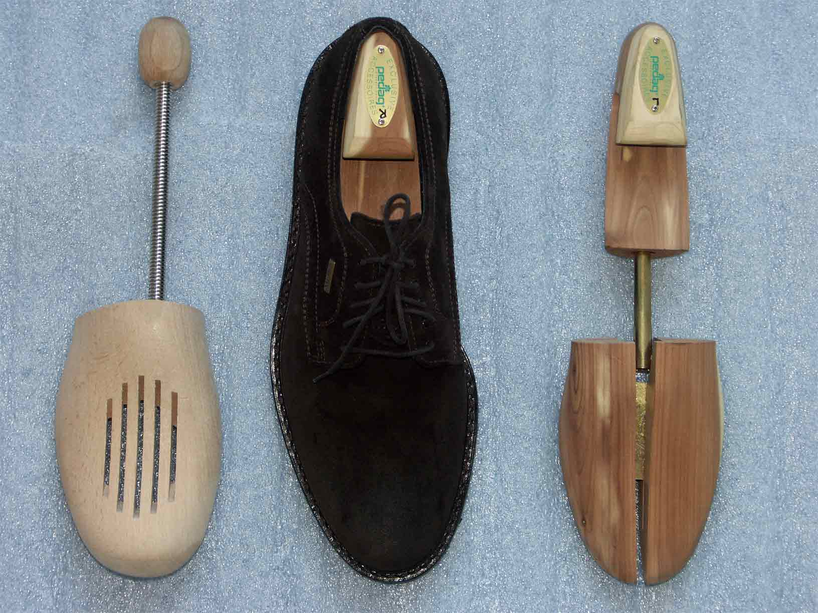 Herrenhalbschuh mit Schuhspannern/ shoetrees, own photography